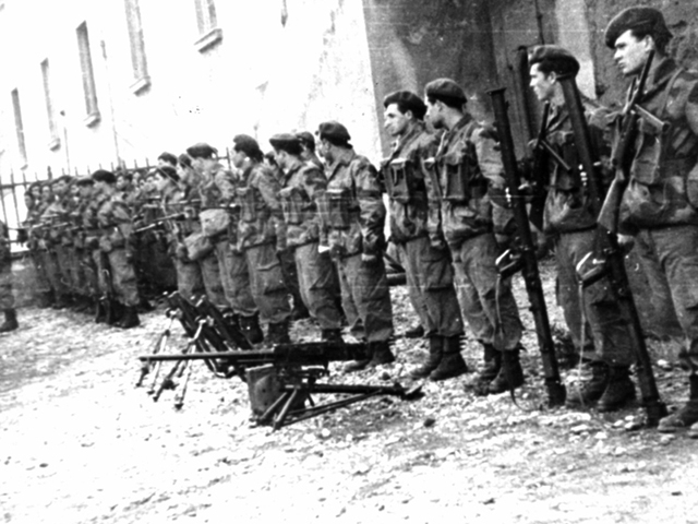 Una squadra di Arditi Incursori si prepara per una esercitazione.